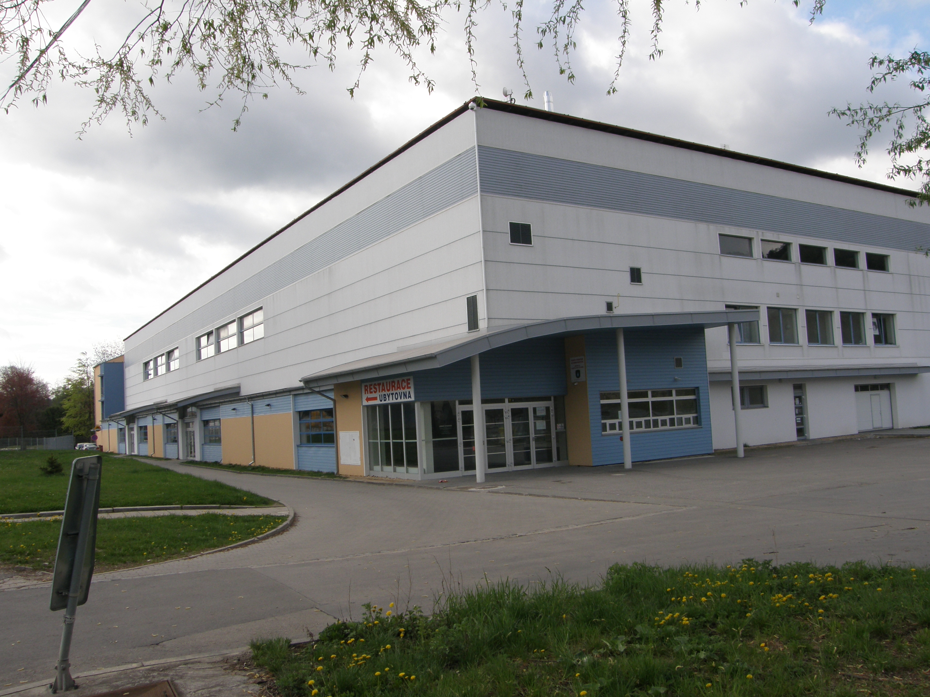 Zimní stadion v Blansku